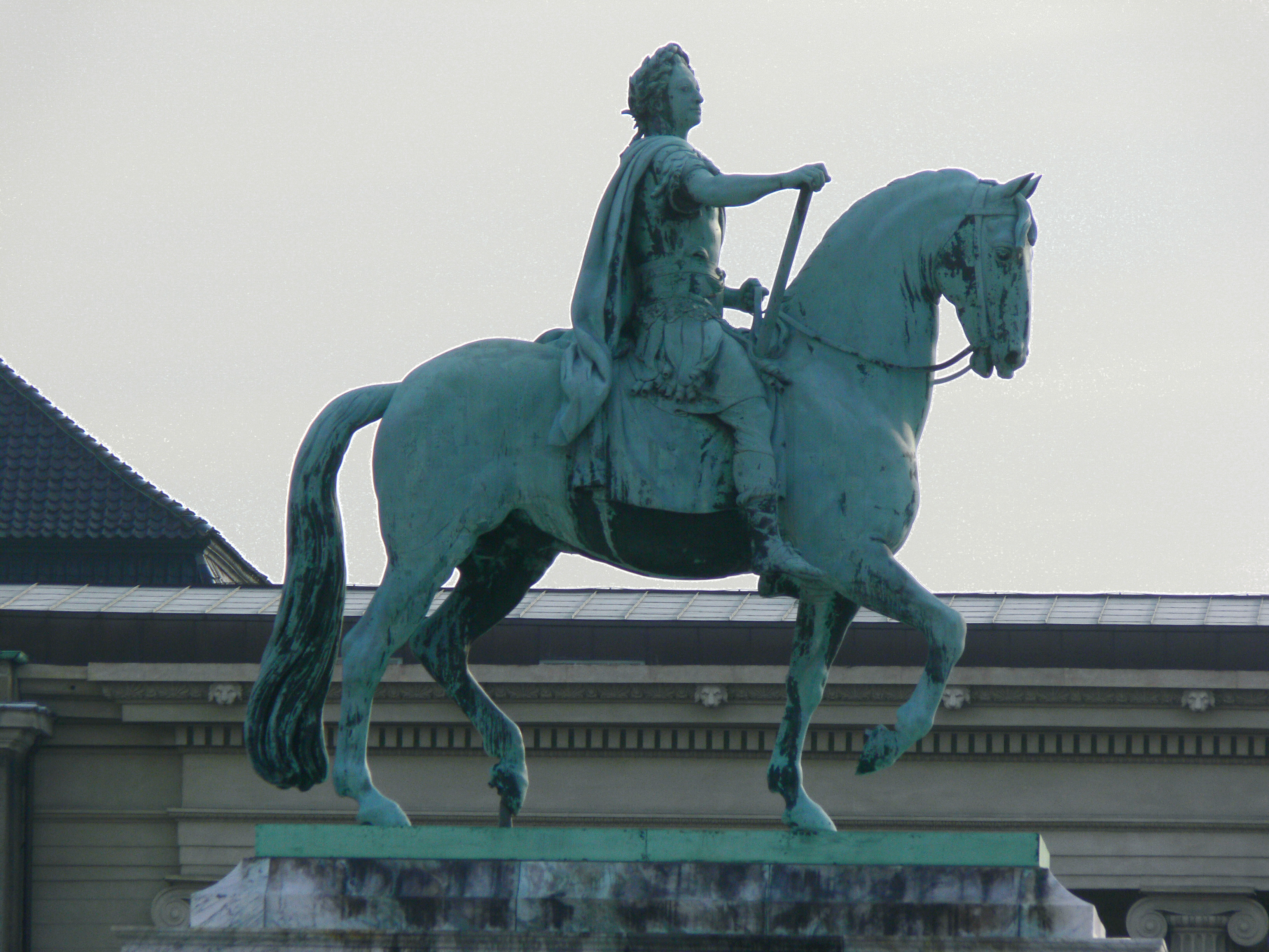 Friedrich V., König von Dänemark und Norwegen 1746-1766.